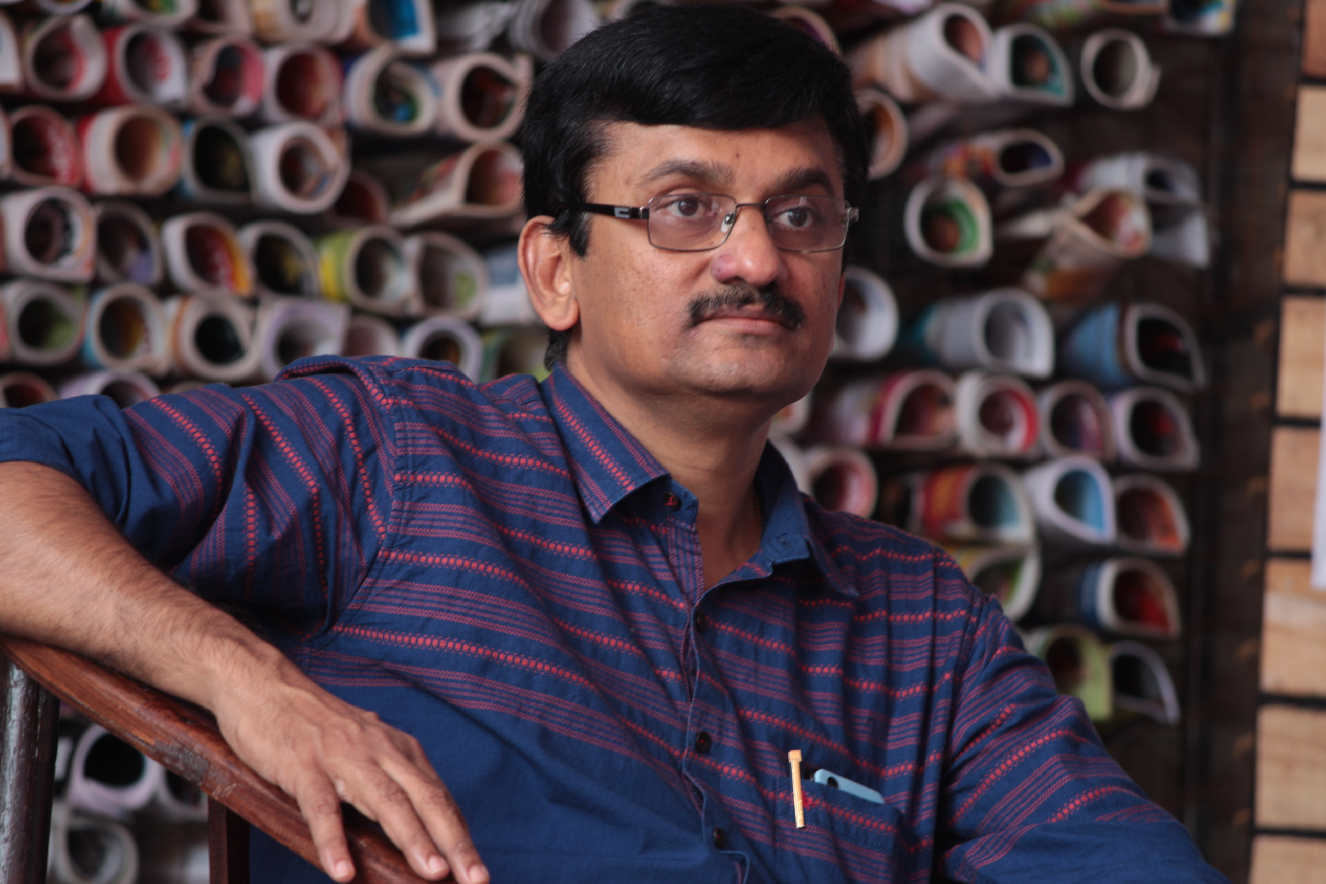 മലയാളം ഉത്തരാധുനിക കവി